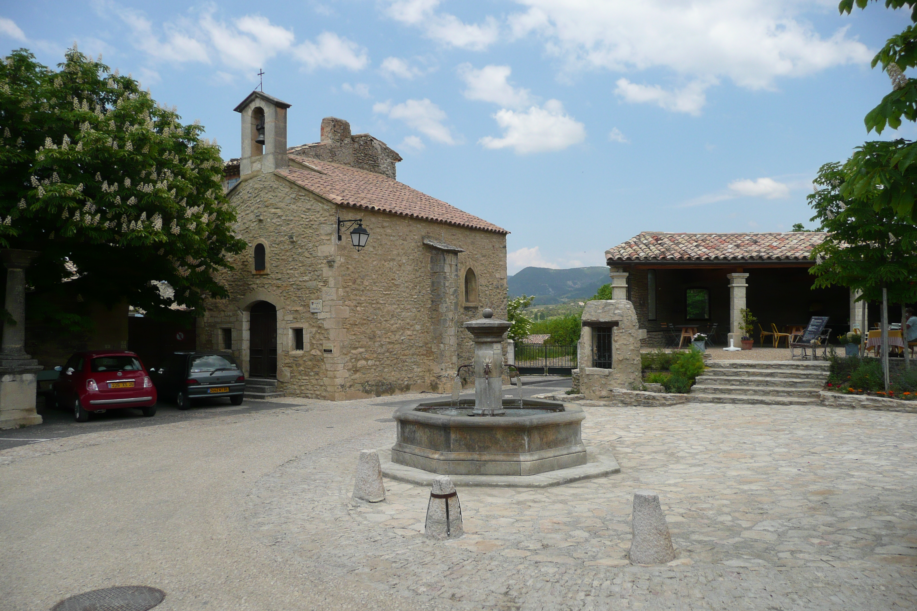 Place de la chapelle des 7 douleurs, à Faucon (Vaucluse).